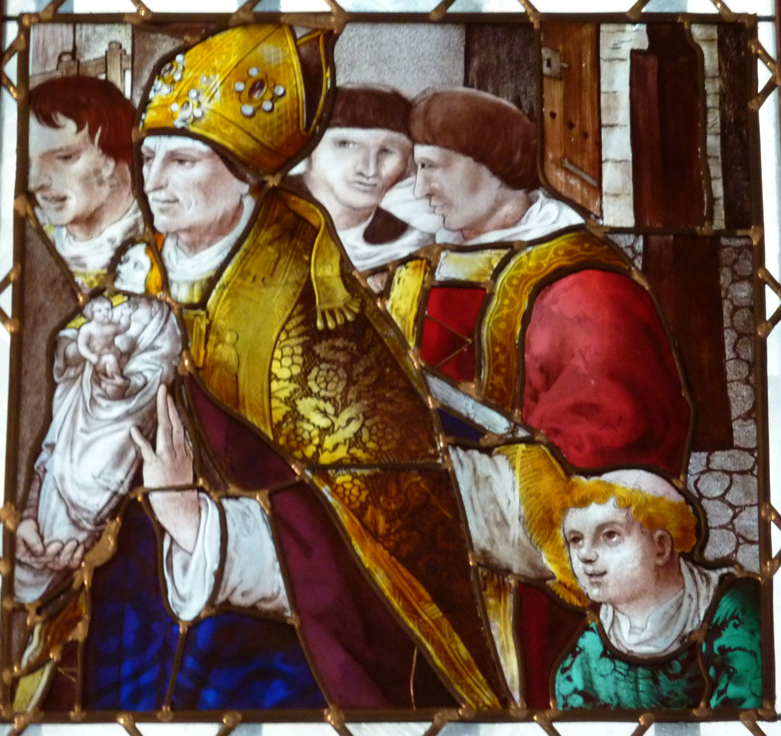 Fragment einer Bleiglasscheibe im Museum Carnavalet in Paris, ehemals in der Kirche St-Gervais-St-Protais in Paris (15./16. Jahrhundert), Darstellung: Der Bischof von Lisieux (Jean Le Veneur (Kardinal von Tillières) 1505–1539) trägt eine silberne Statue bei einer Prozession am 12. Juni 1528, Glasmaler: Jean Chastellain